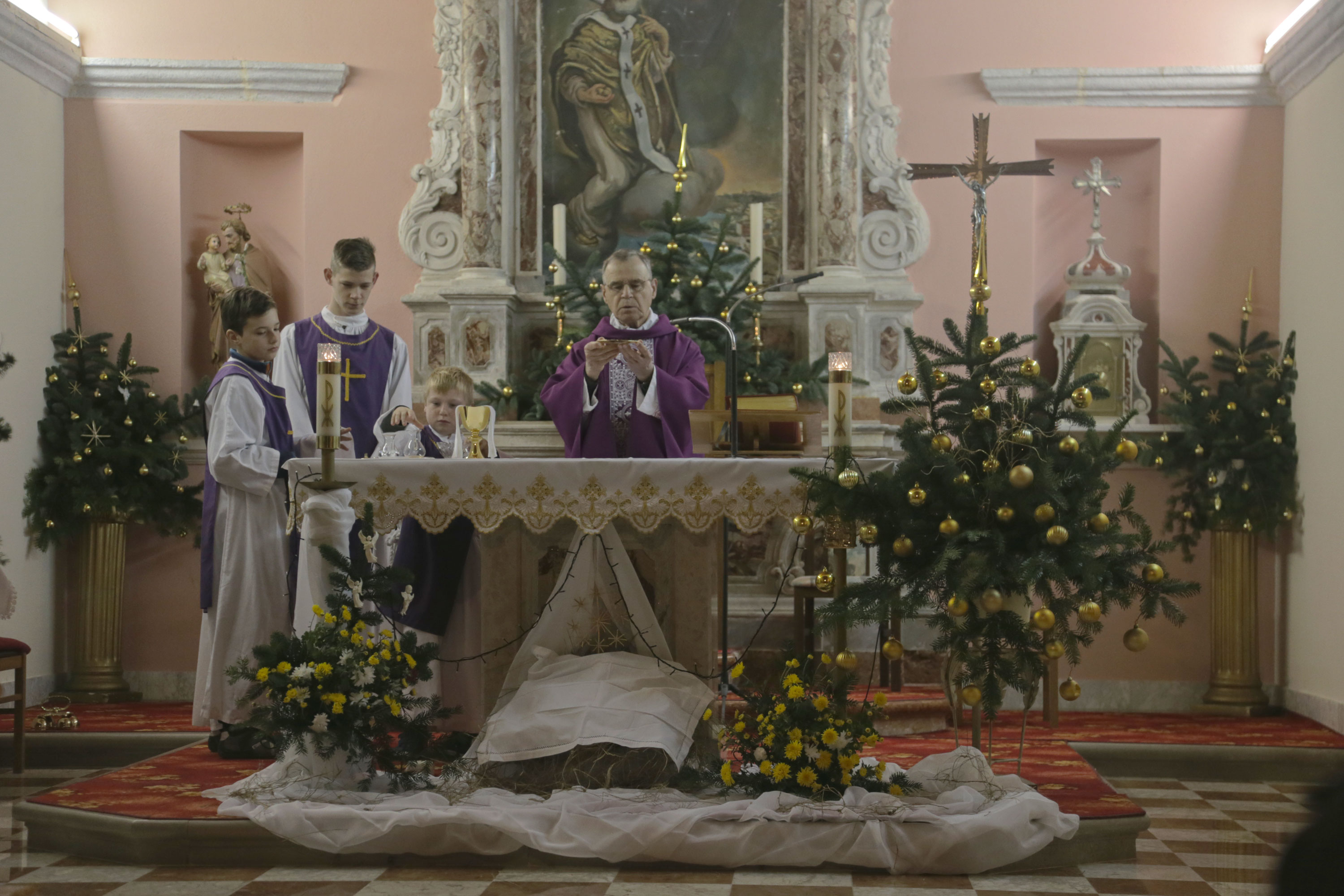 Holy mass at parish church of Saint Nicholas, Island of Susak, Croatia